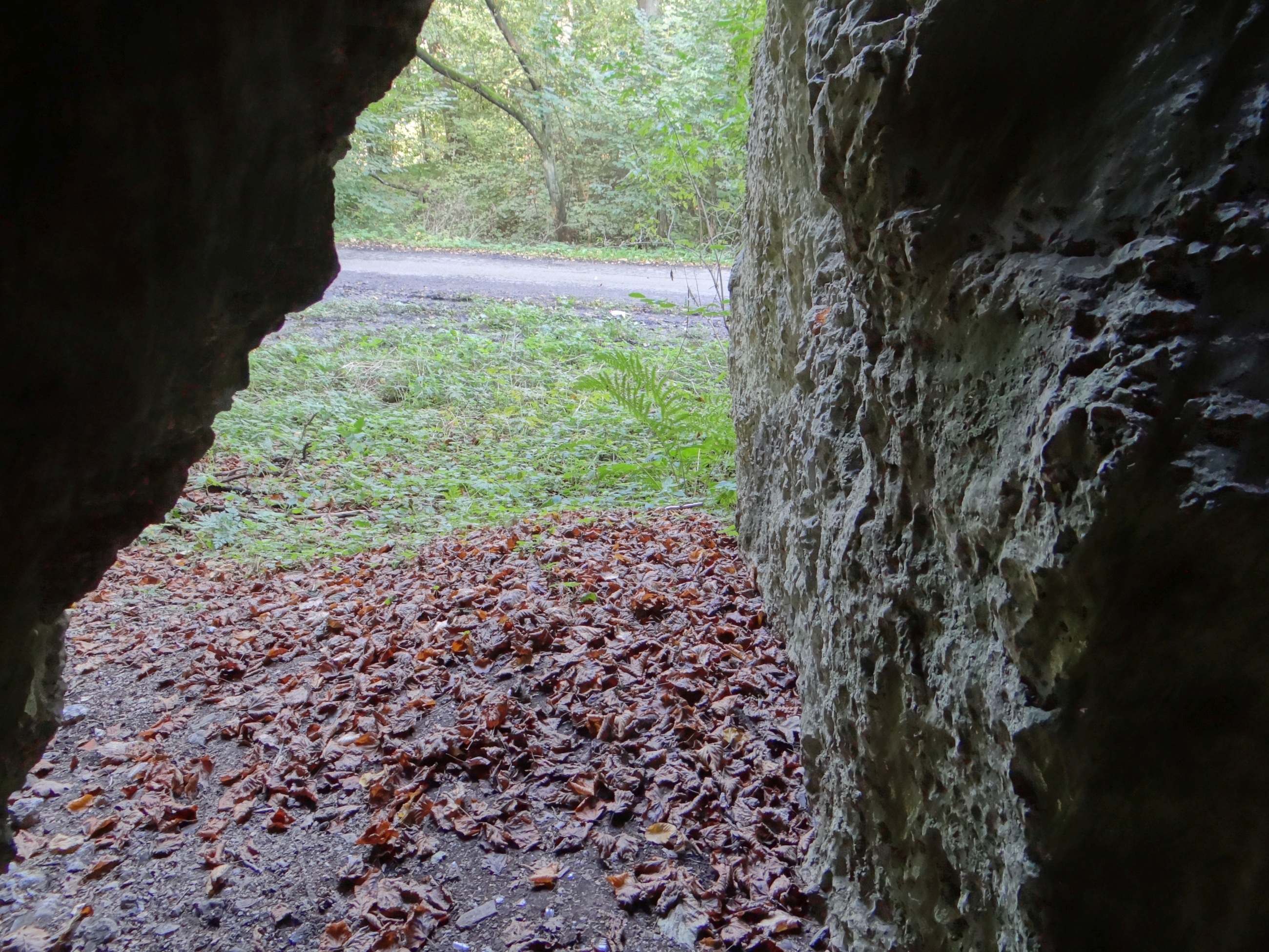 Schronisko obok Jaskini Gaudynowskiej